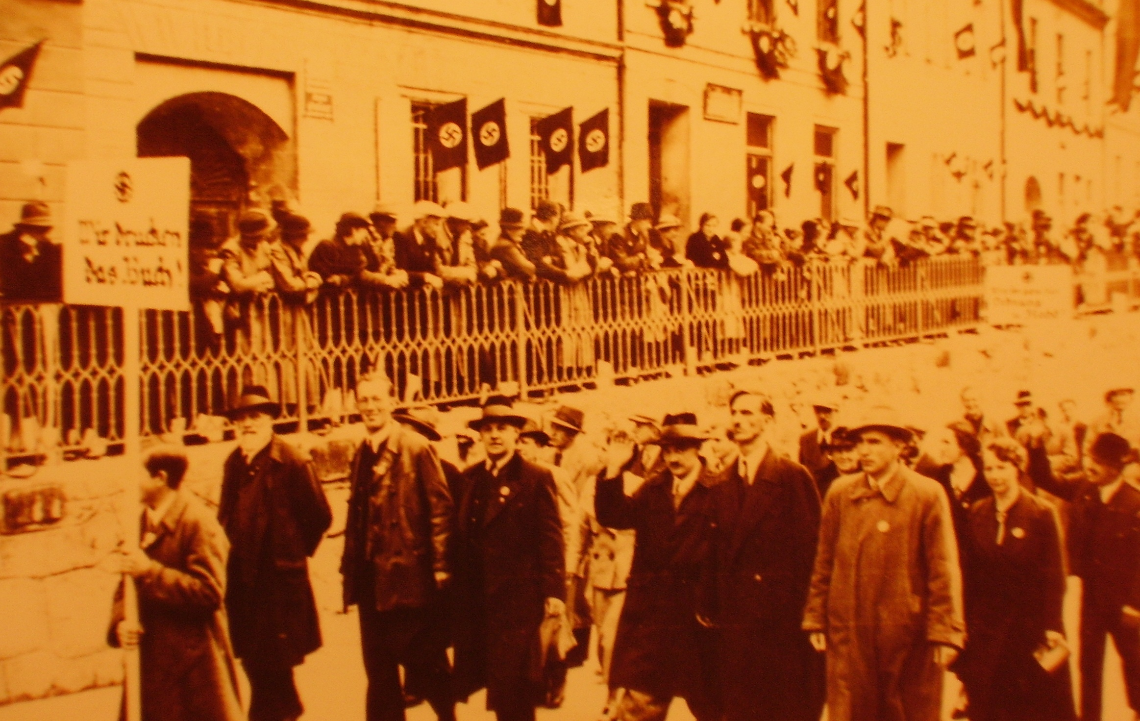 Judenburg after 1938 Anschluss